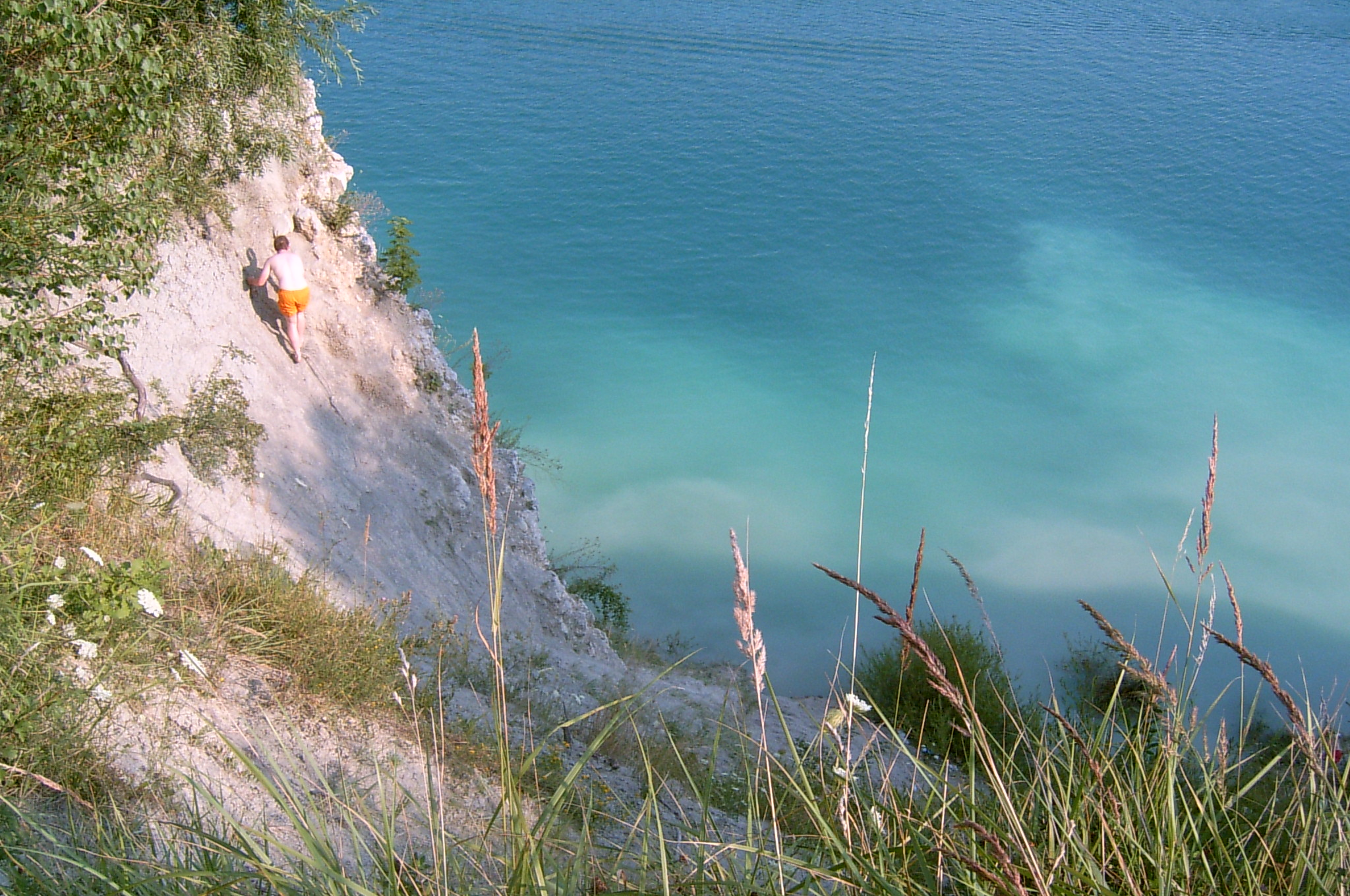 Kraków, Poland - Lake Zakrzówek